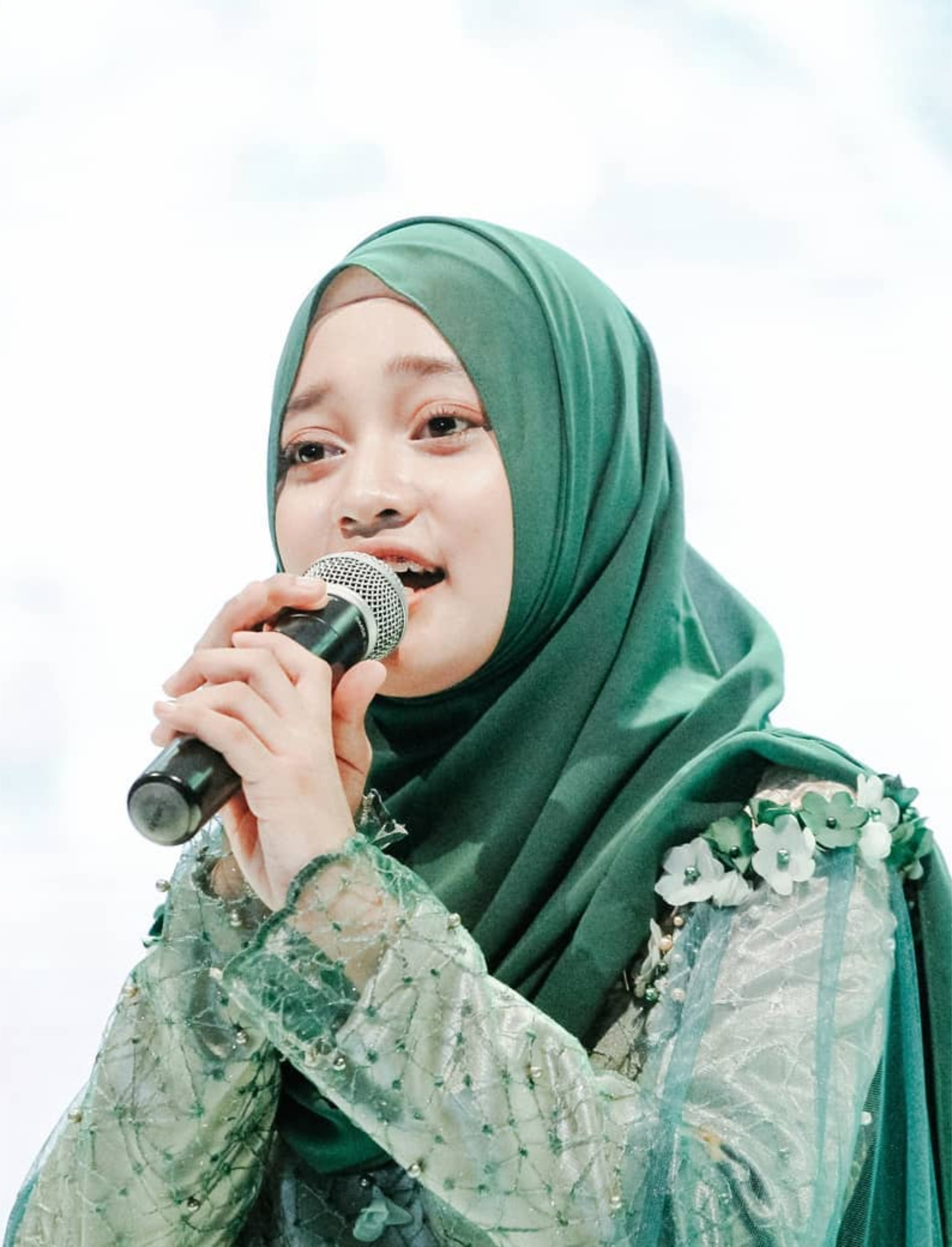 Veve Zulfikar